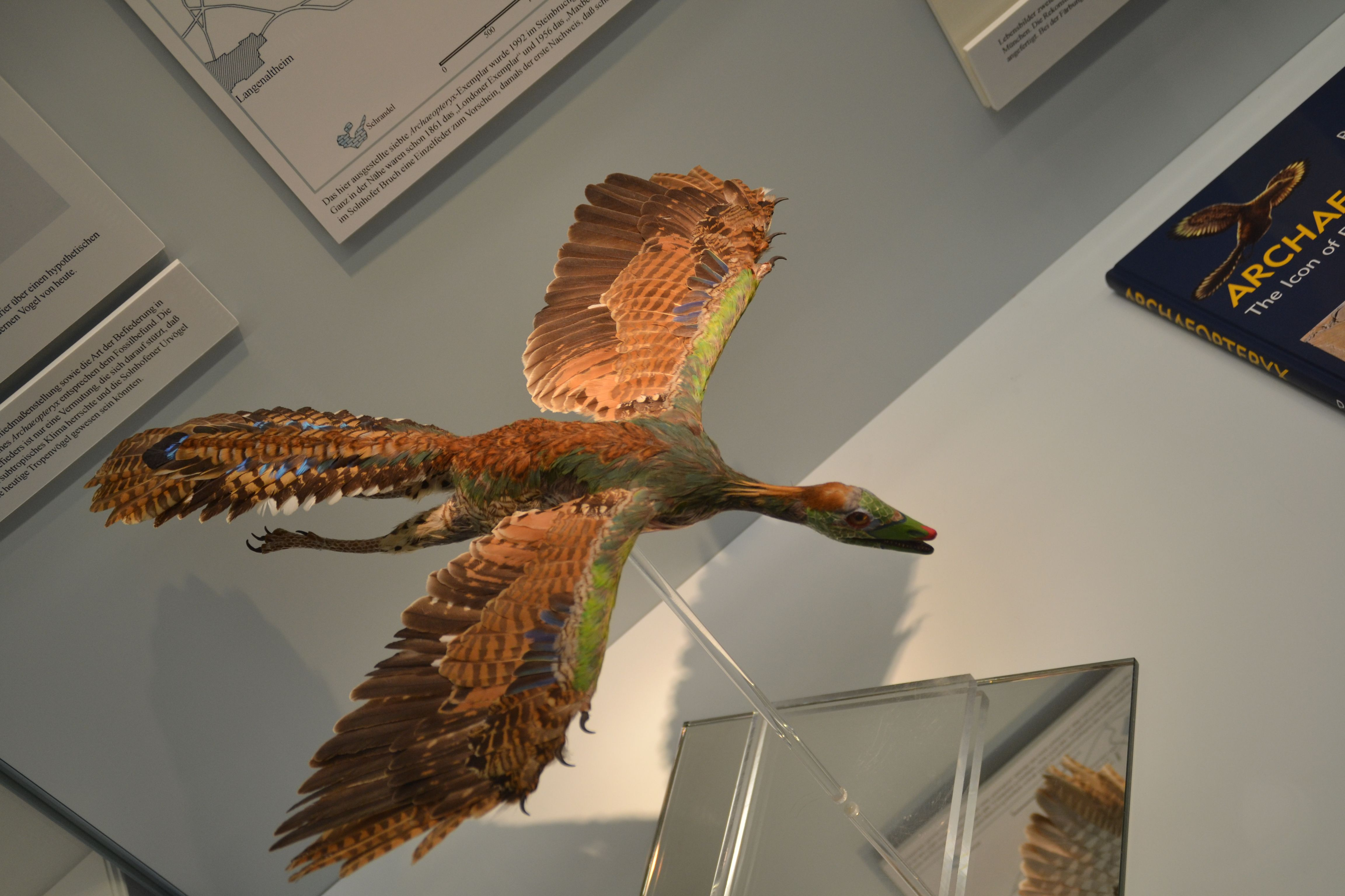 Müncheni Palaeontológiai Múzeum